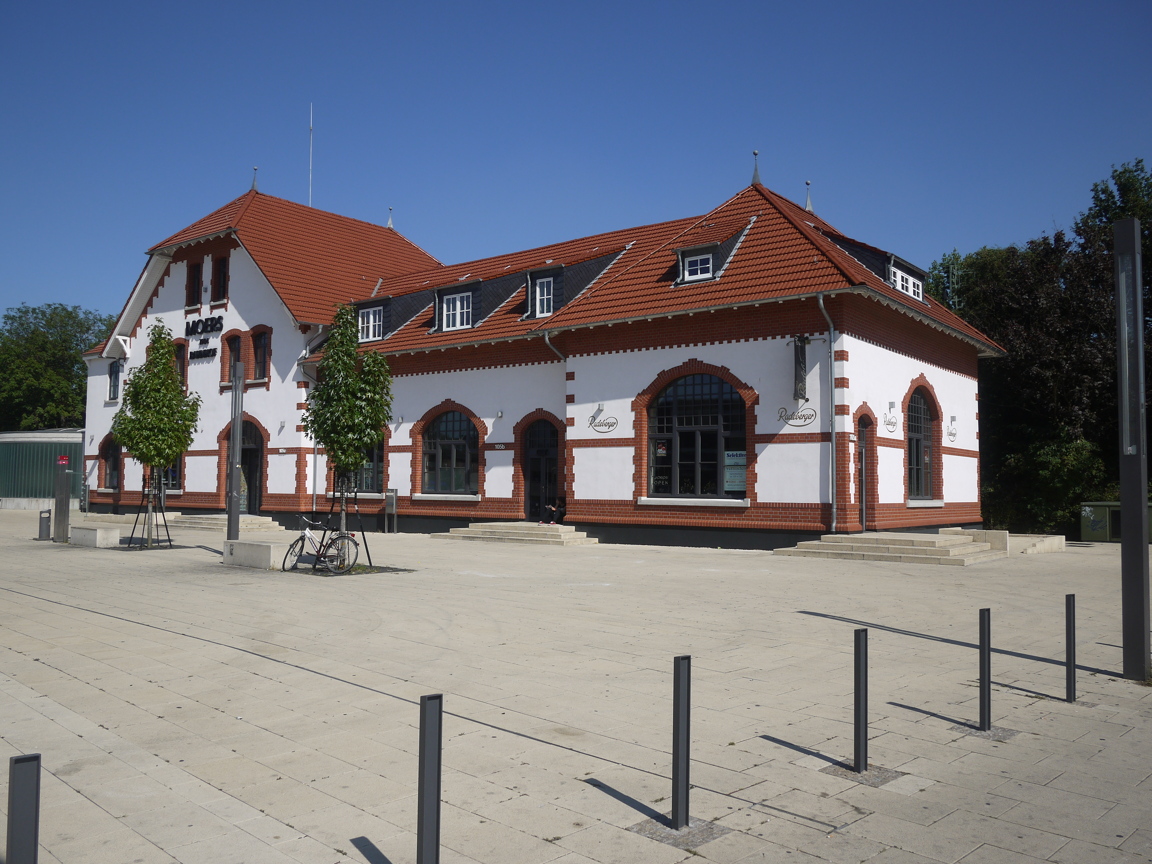 Bahnhof in Moers an der Homberger Straße, denkmalgeschützt